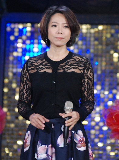 曾心梅出席三立電視綜藝節目《超級夜總會》錄影。